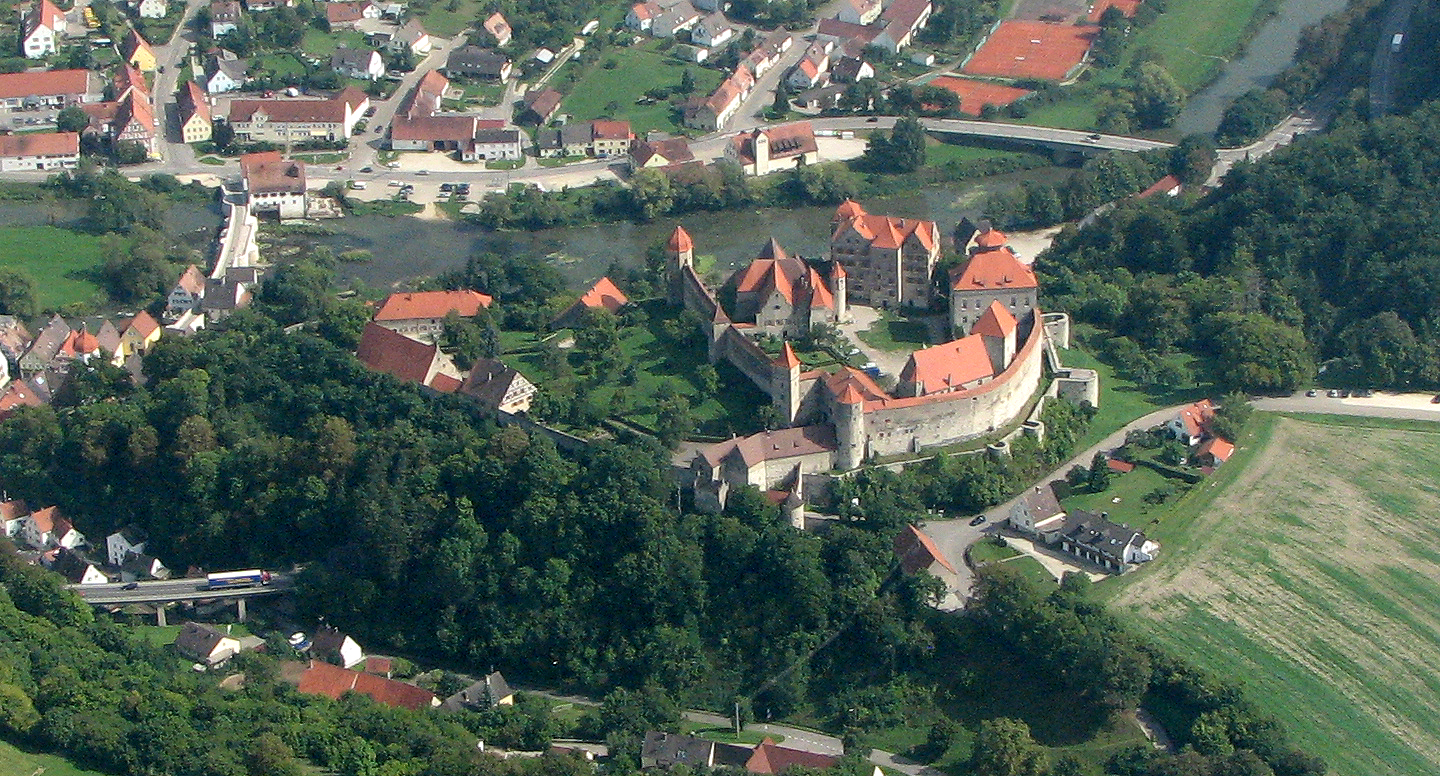 Burg Harburg (Schwaben) aus Westen